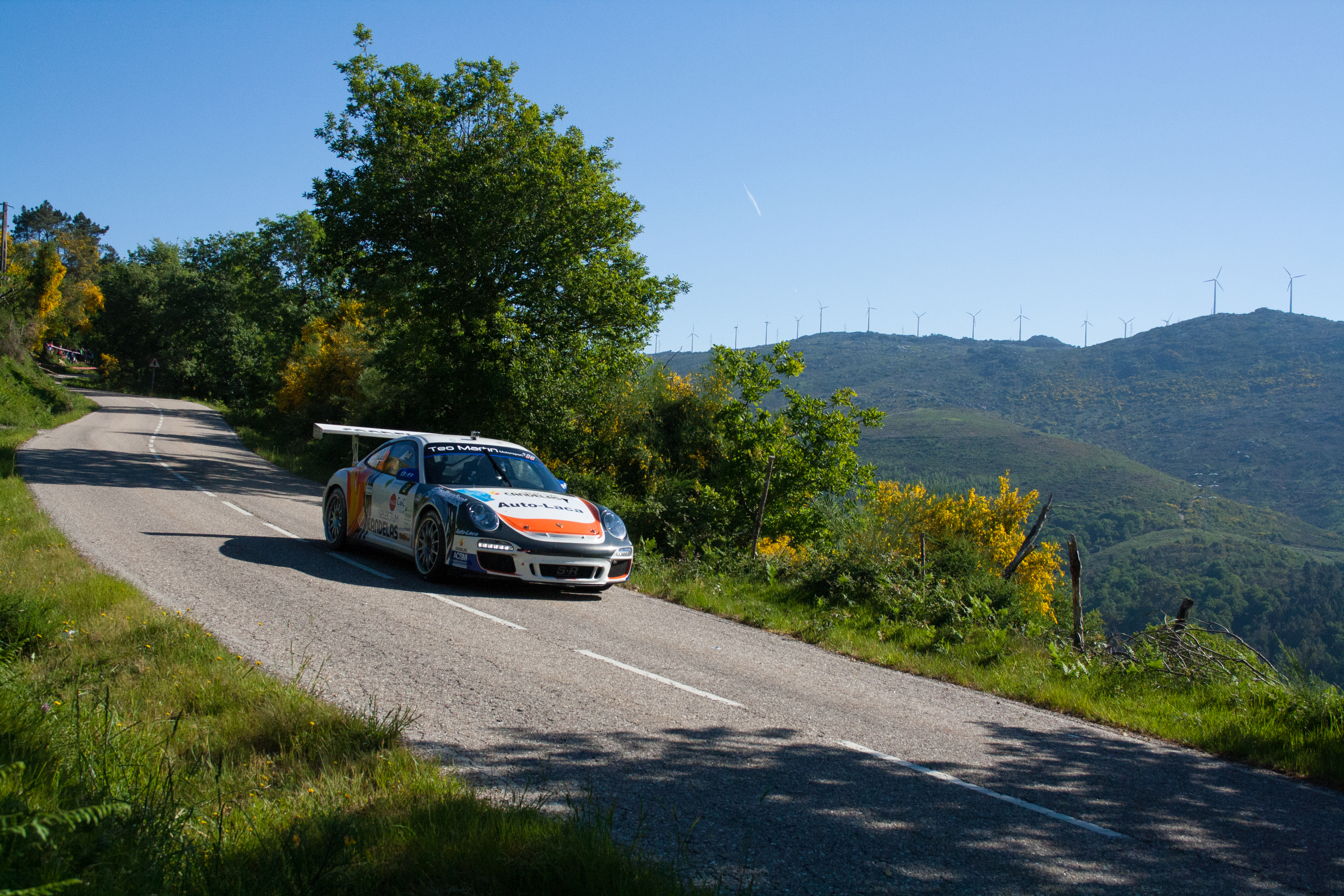 PEDRO BURGO MARCOS BURGO